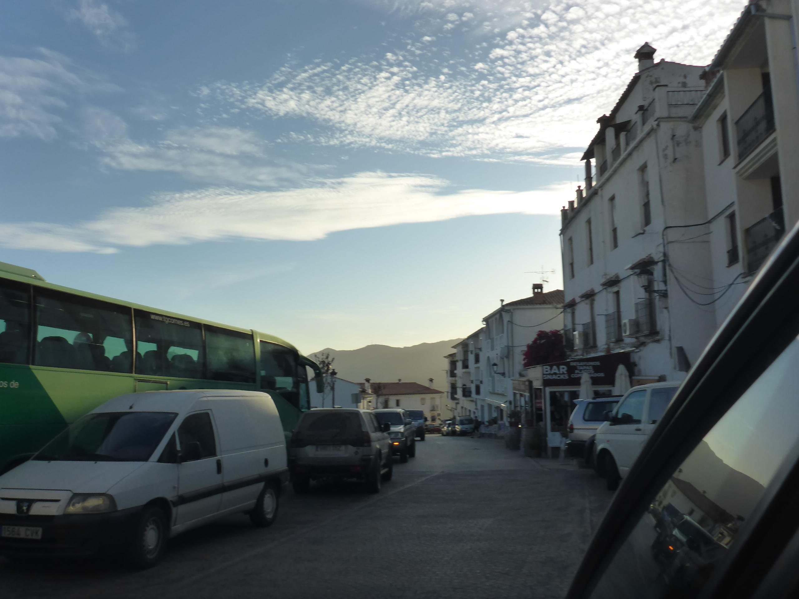 Jubrique (España)